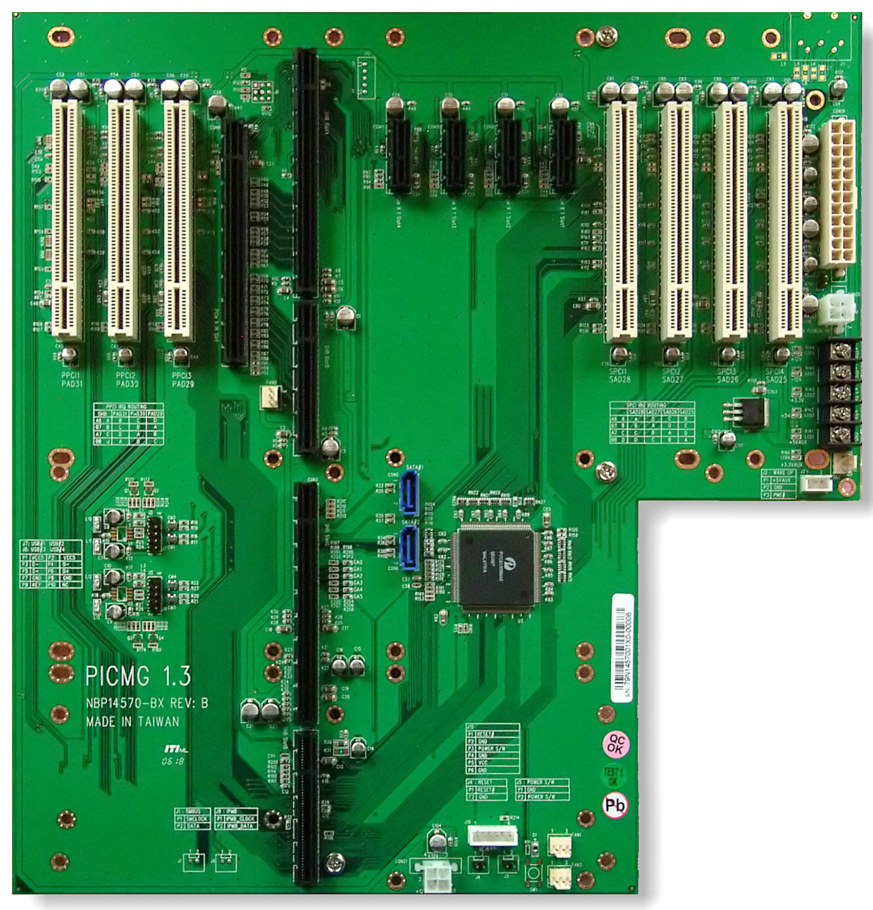 Busplatine für Slot-CPU mit PCI-, PCIe×1- und PCIe×16-Slots. PICMG 1.3